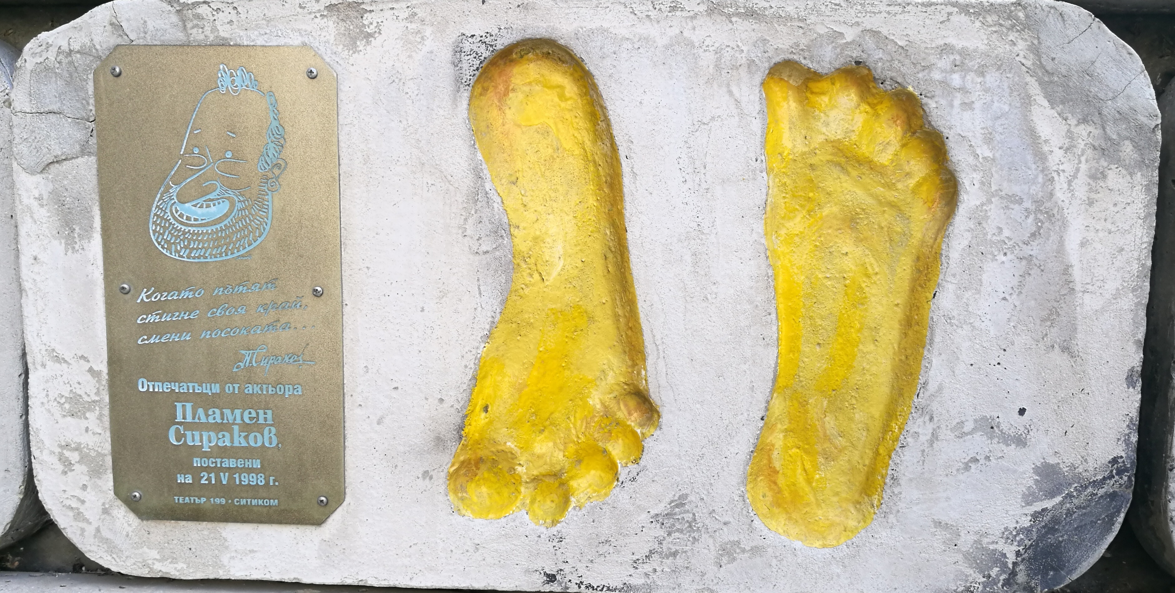 Стената на славата пред Театър 199 - пано с отпечатъци, послание и шарж на Пламен Сираков.